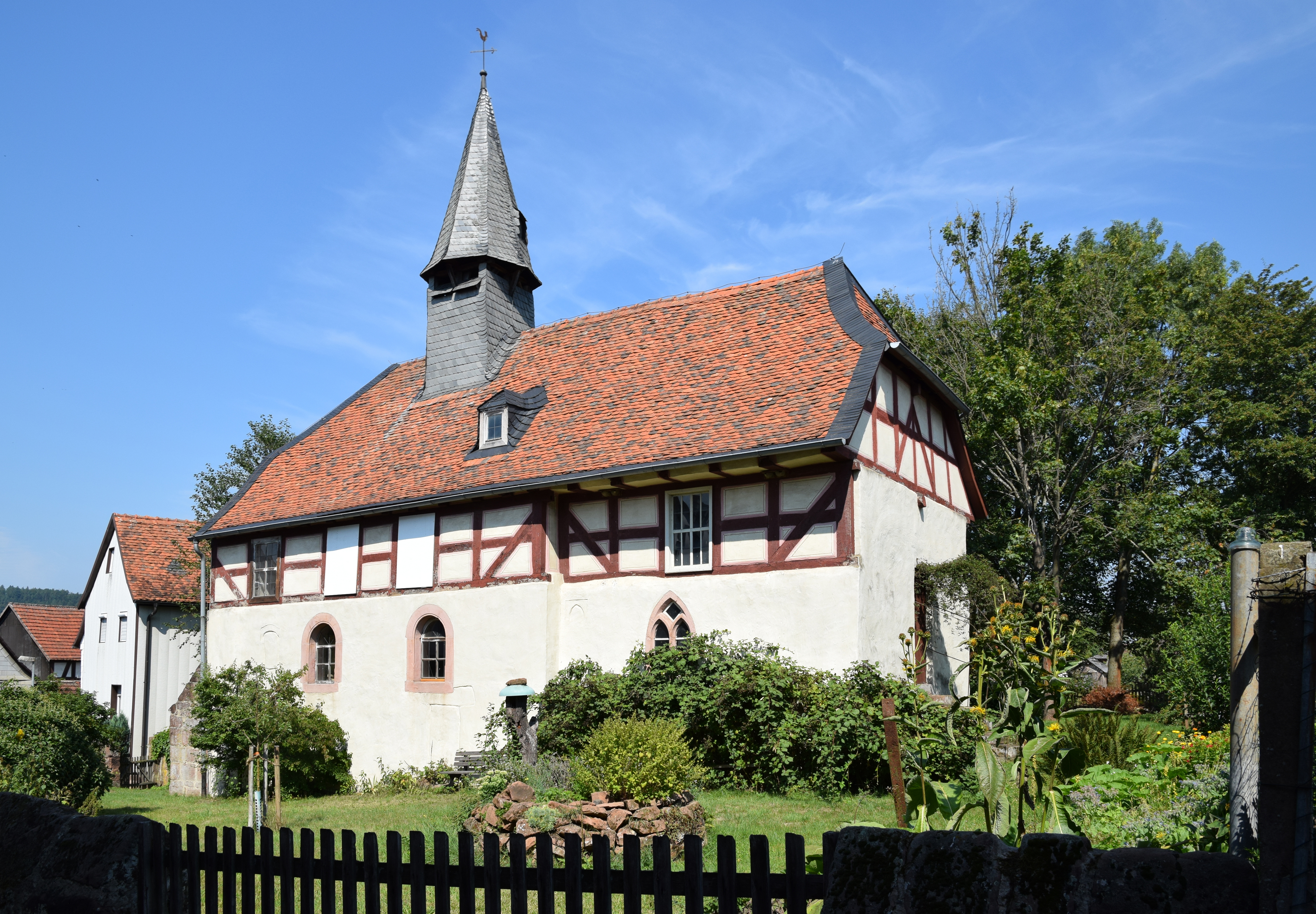 Die alte Kirche in Bürgeln